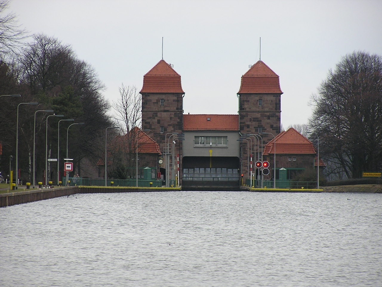 Die Schachtschleuse am Wasserstraßenkreuz Minden in Minden, Nordrhein-Westfalen. Die Schleuse verbindet Mittellandkanal und Weser. Das Foto zeigt die Einfahrt vom Mittellandkanal aus. Die Schachtschleuse überwindet einen Höhenunterschied von etwa 13 m zwischen den beiden Wasserstraßen. Sie wurde in den Jahren 1911-1914 mit einer nutzbaren Kammerlänge von 82 m und einer Breite von 10 m als massives Bauwerk errichtet.